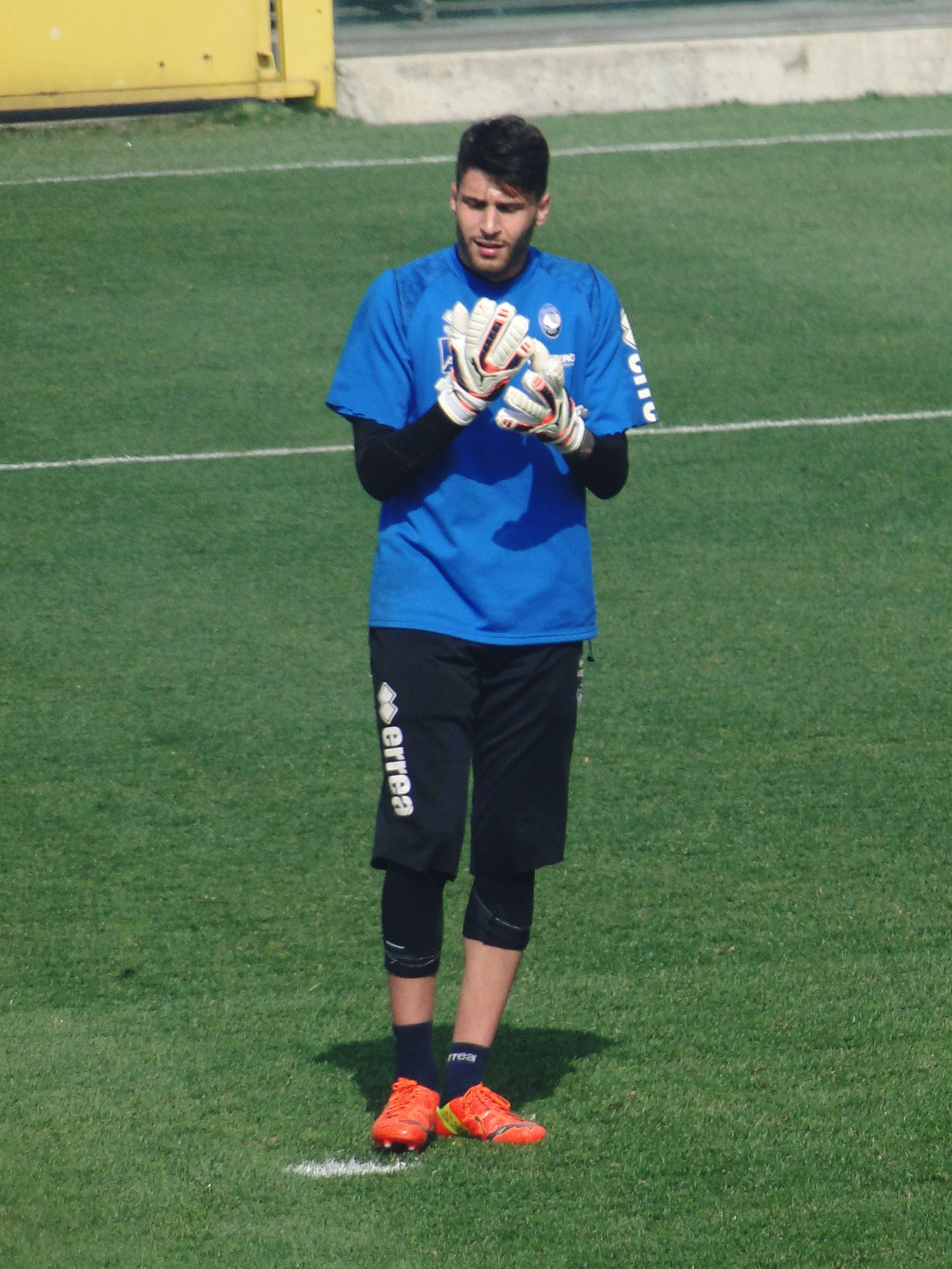 Marco Sportiello, portiere italiano, in allenamento all'Atalanta.